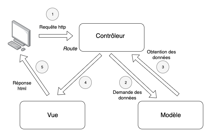 Schéma en français expliquant le paradigme modèle-vue-contrôleur (MVC) dans le cas d'une application web.